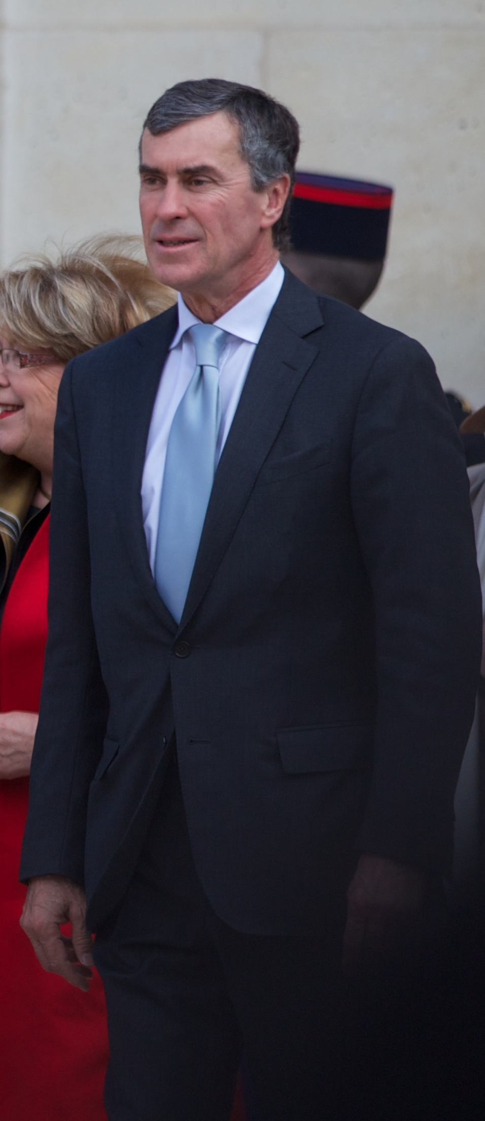 Cérémonie d'investiture du président de la République française le 15 mai 2012, cour d'honneur du Palais de l'Élysée, Paris.